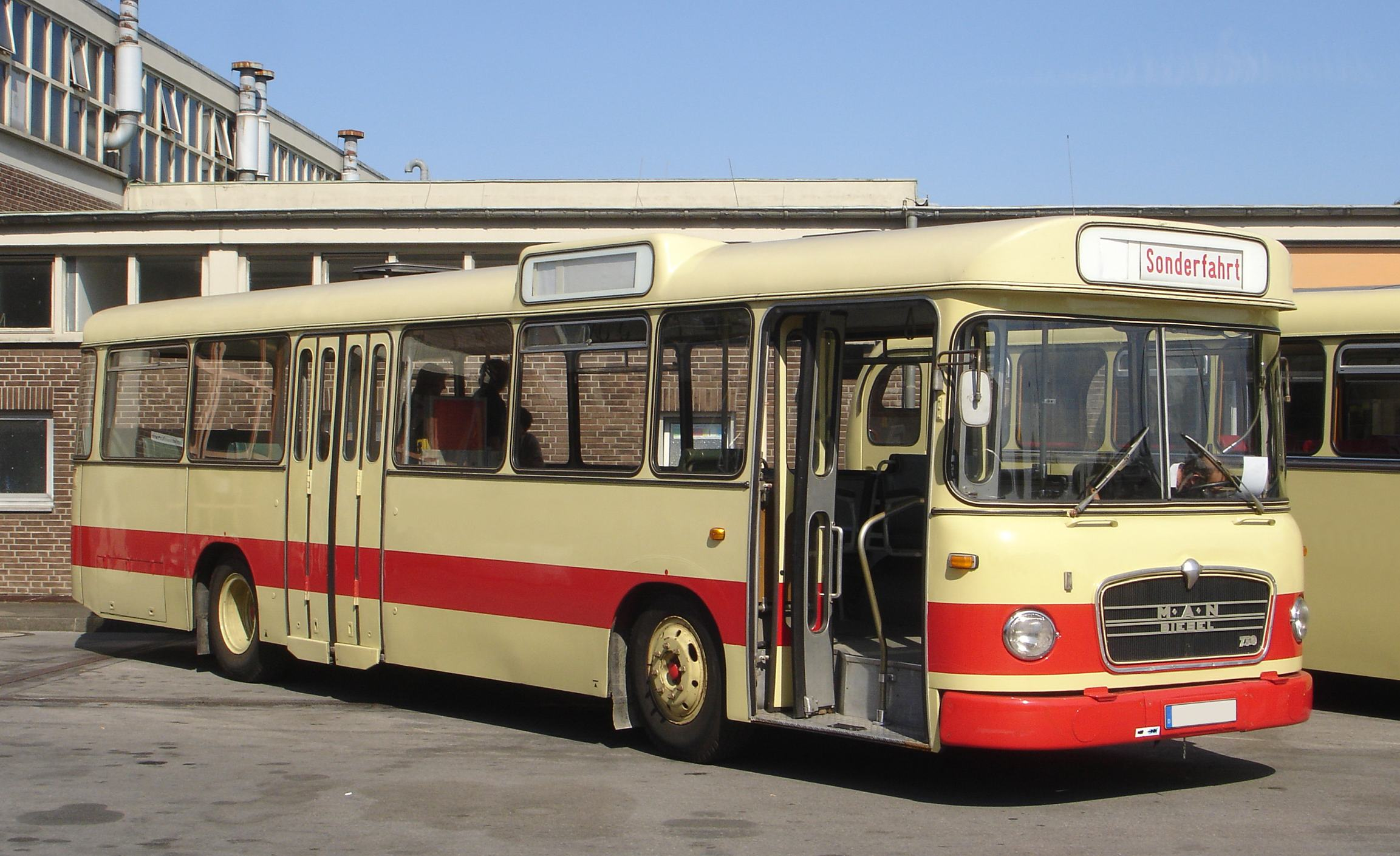 MAN 750HO Linienbus